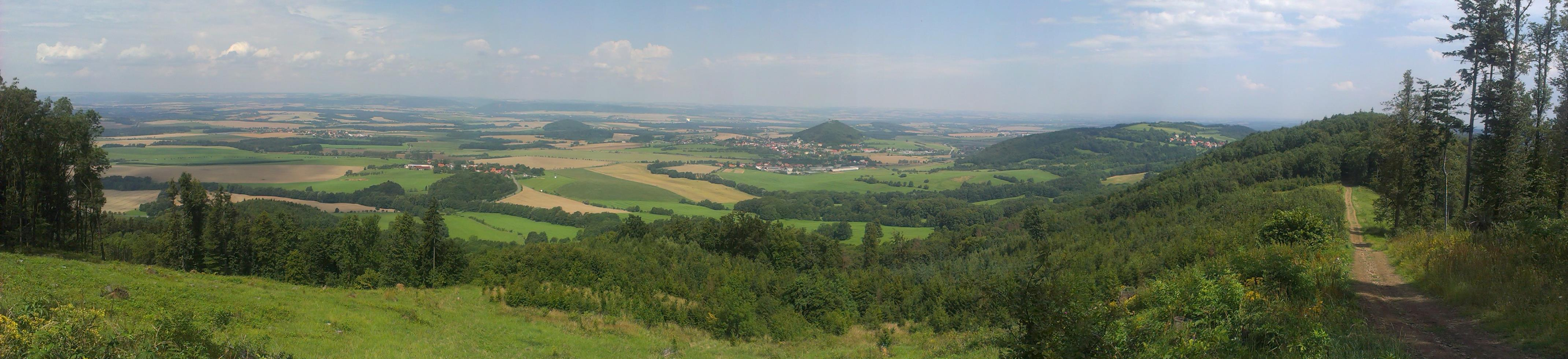 Petřkovice - výhled